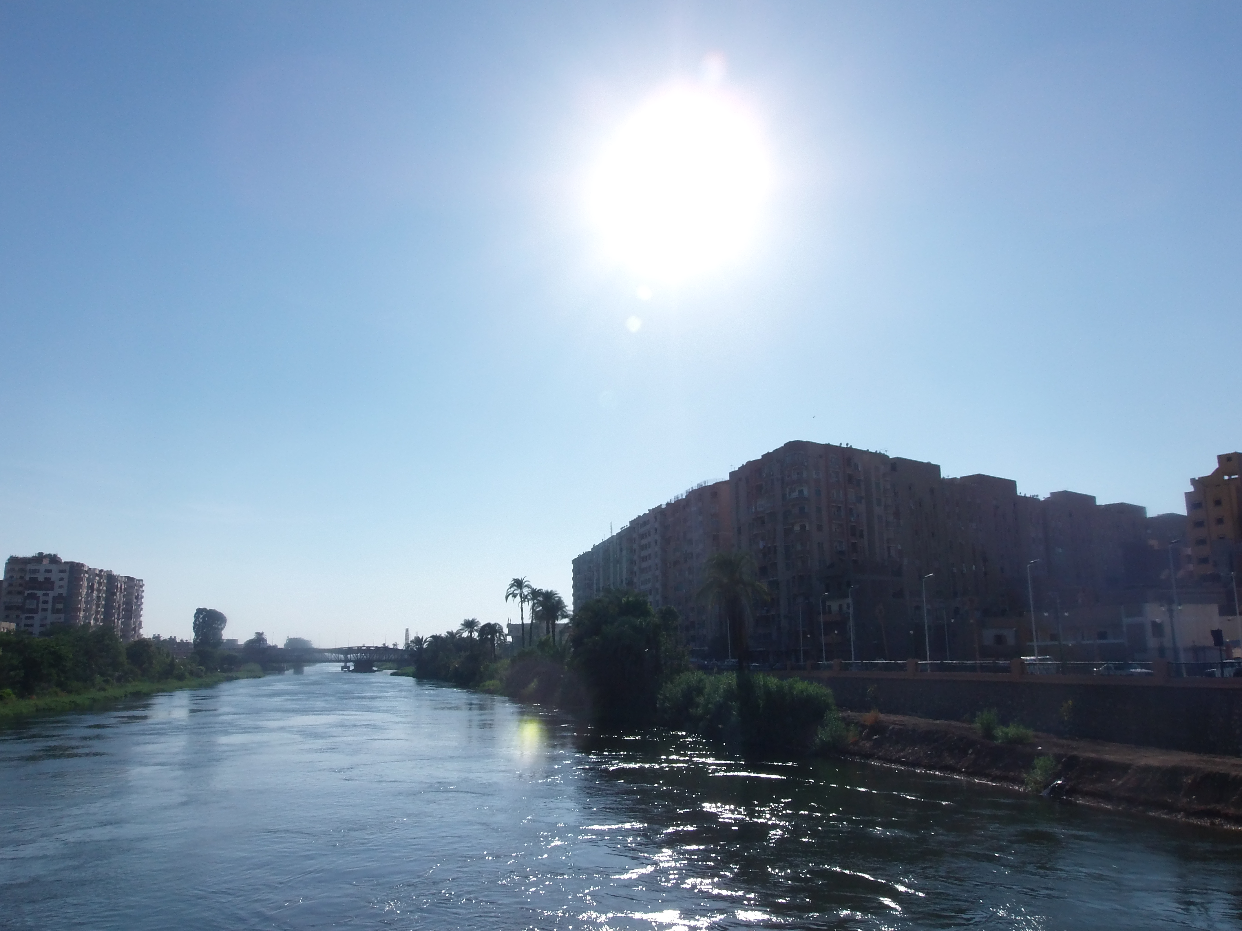 An-Nasr Towers أبراج النصر